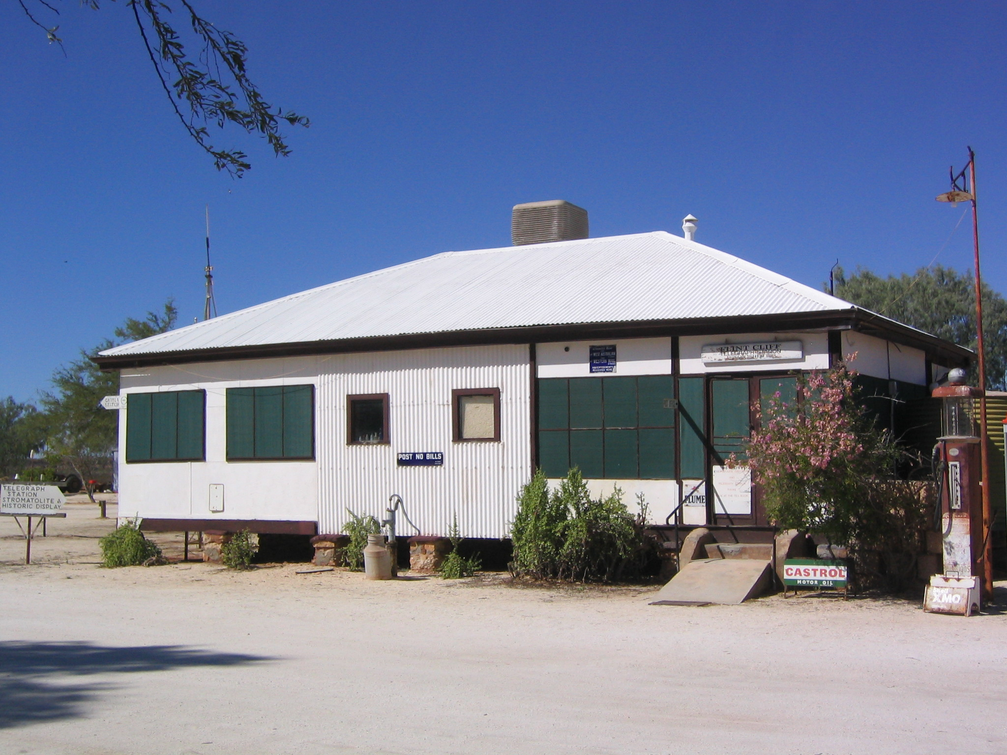 Hamelin Pool (Stromatolites)